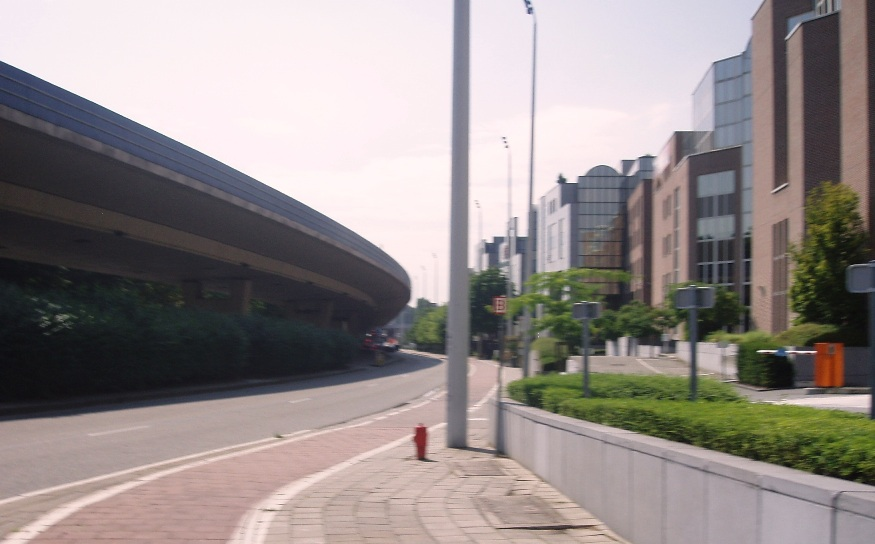 Viaduc Herrmann-Debroux Auderghem E411